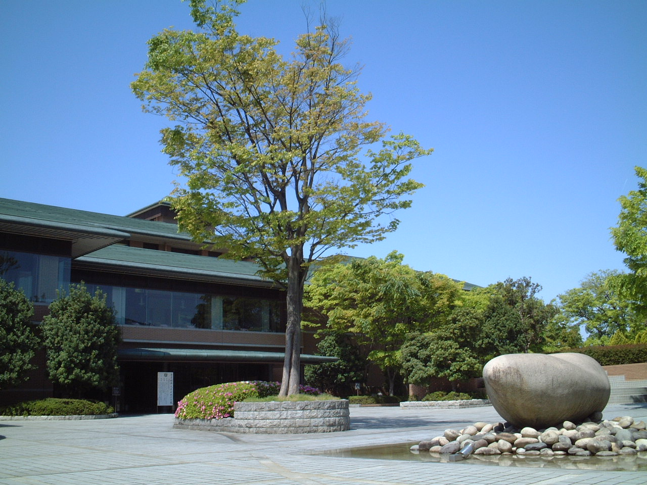 京都市国際交流会館前庭からの全景